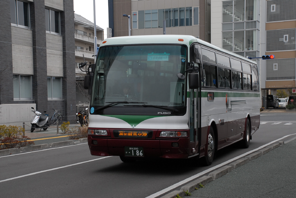 高知駅前にて、撮影時期不明